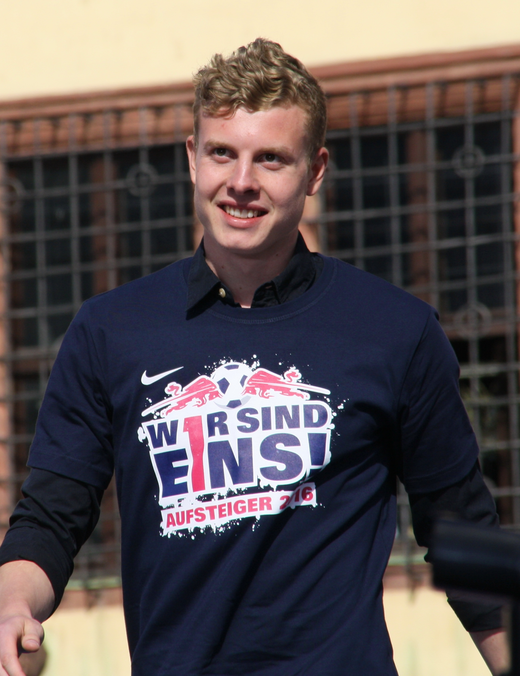 Ken Gipson bei der Aufstiegsfeier RB Leipzig 2016